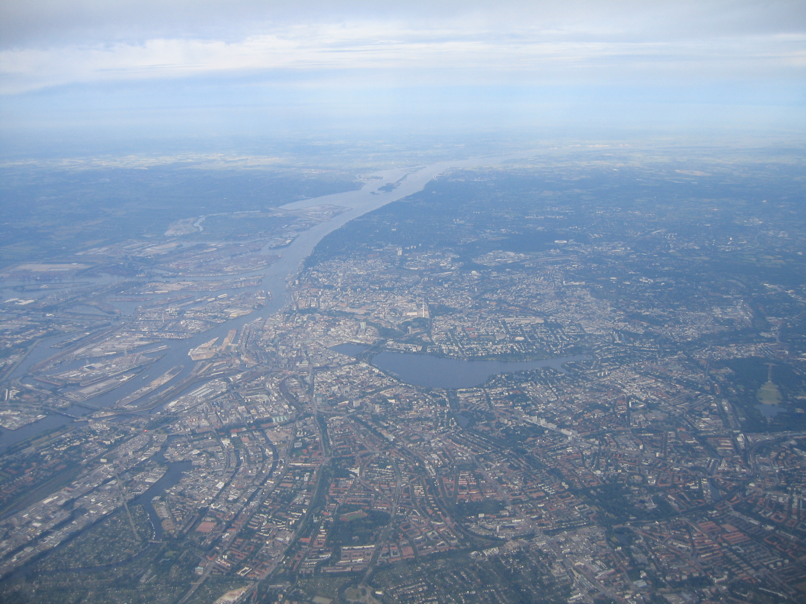 Hamburg während eines Überfluges.